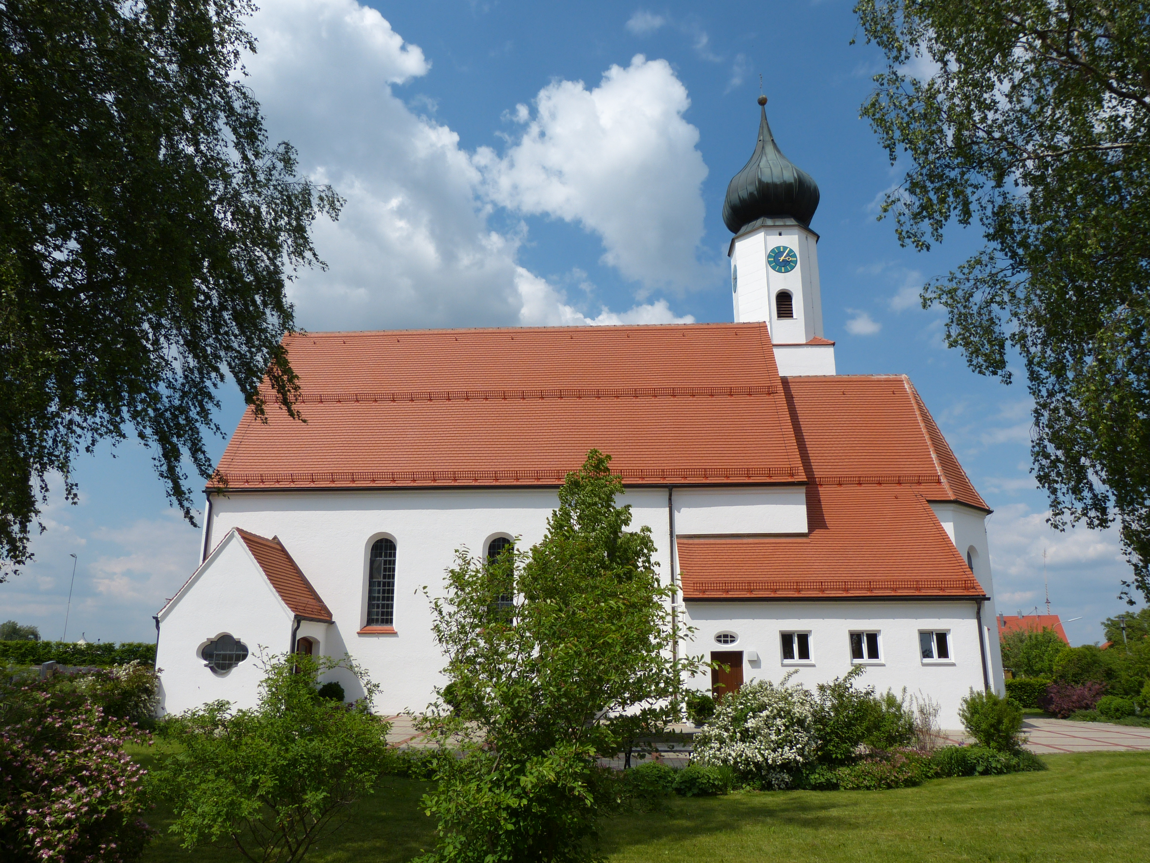 Patrona Bavariae, Oberegg, Landkreis Unterallgäu, Bayern